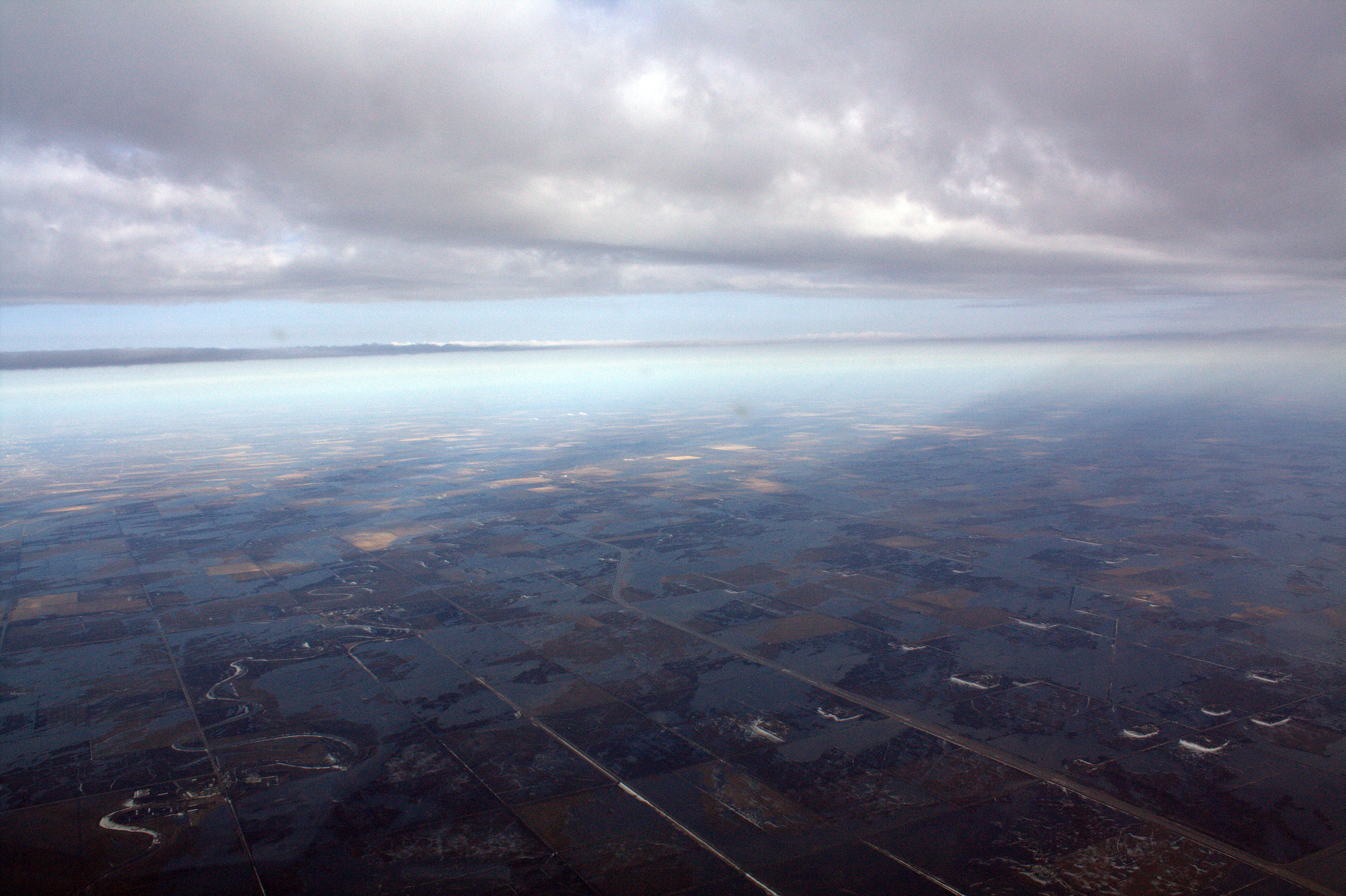 Flooding in Manitoba